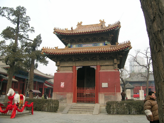 东岳庙碑亭，smartneddy摄于北京东岳庙，替她传